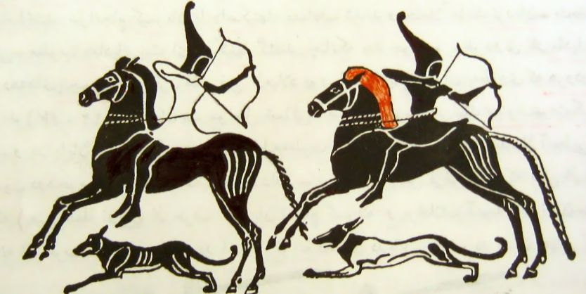 کیمریان (فراریان)، تصویری بر ظرفی از تمدن پونتی (پنتوس)؛ اواسط قرن ششم پ. م.